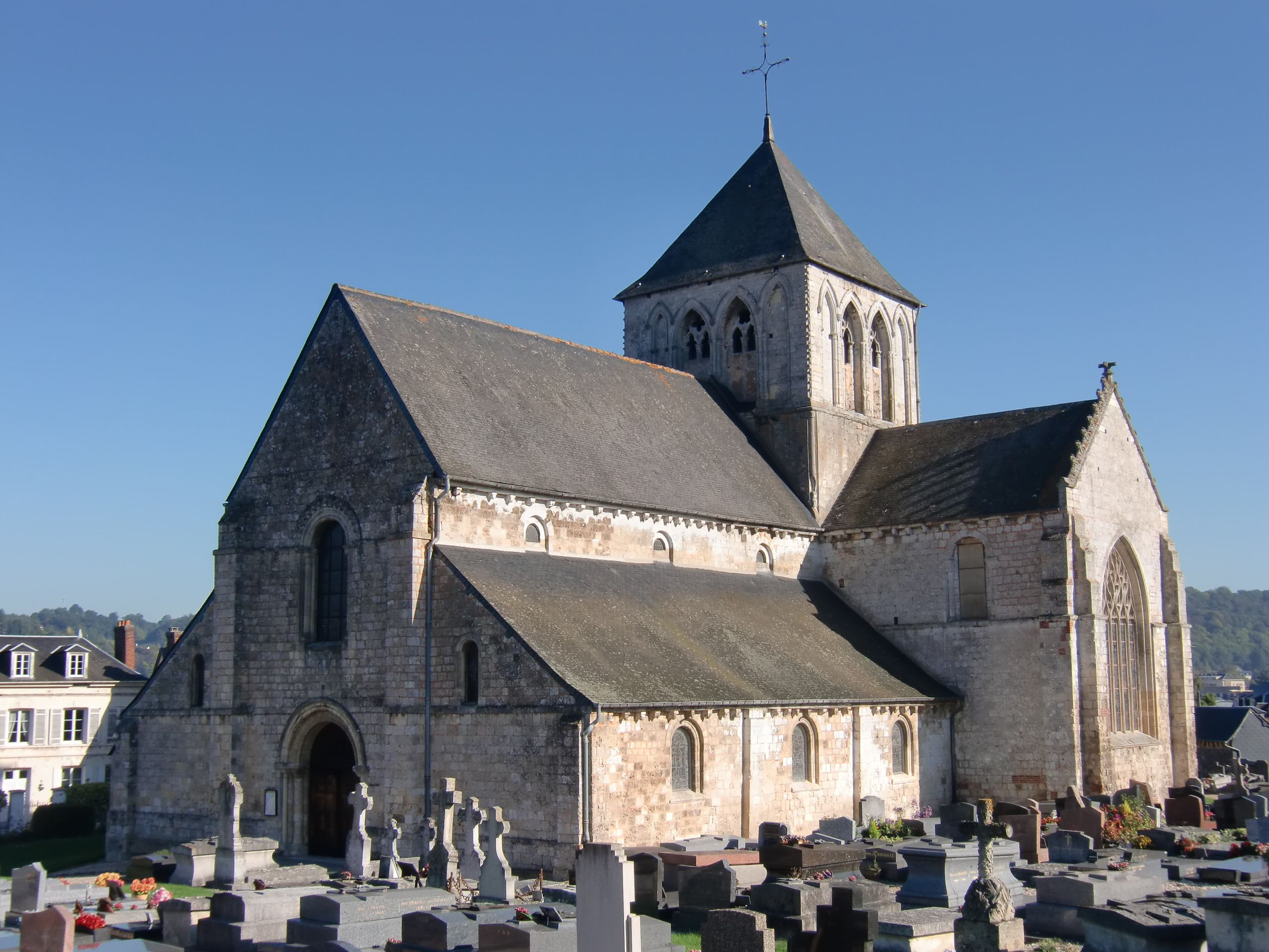 Eglise de Saint-Germain-Village (Eure, Normandie, France)